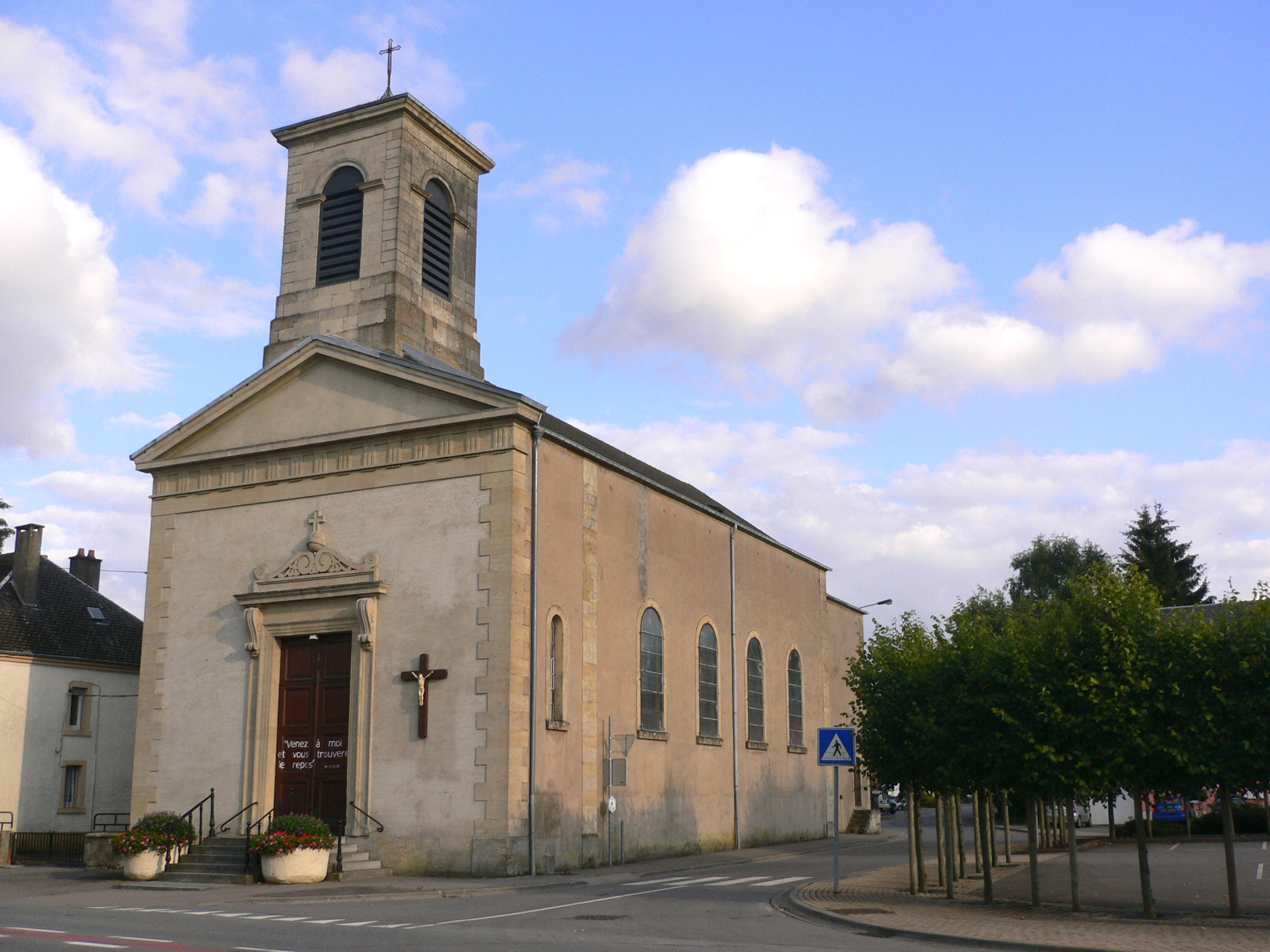 Eglise de Stockem, province du Luxembourg, Belgique